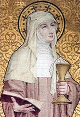 Saint Berlinda of Meerbeke - benedictine nun, hermit